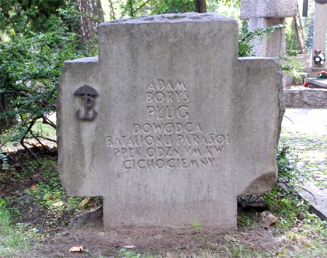 Grób Adama Borysa na Powązkach wojskowych w Warszawie (fot Zu)